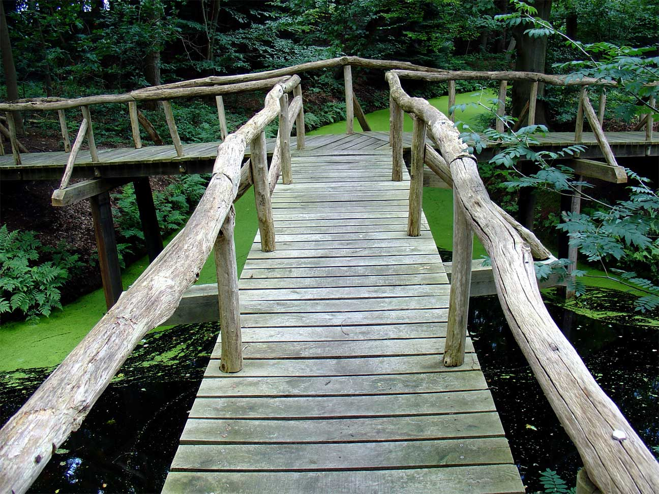 Landgoed van de Fraeylemaborg (Slochteren) ontworpen door Lucas Pieters Roodbaard